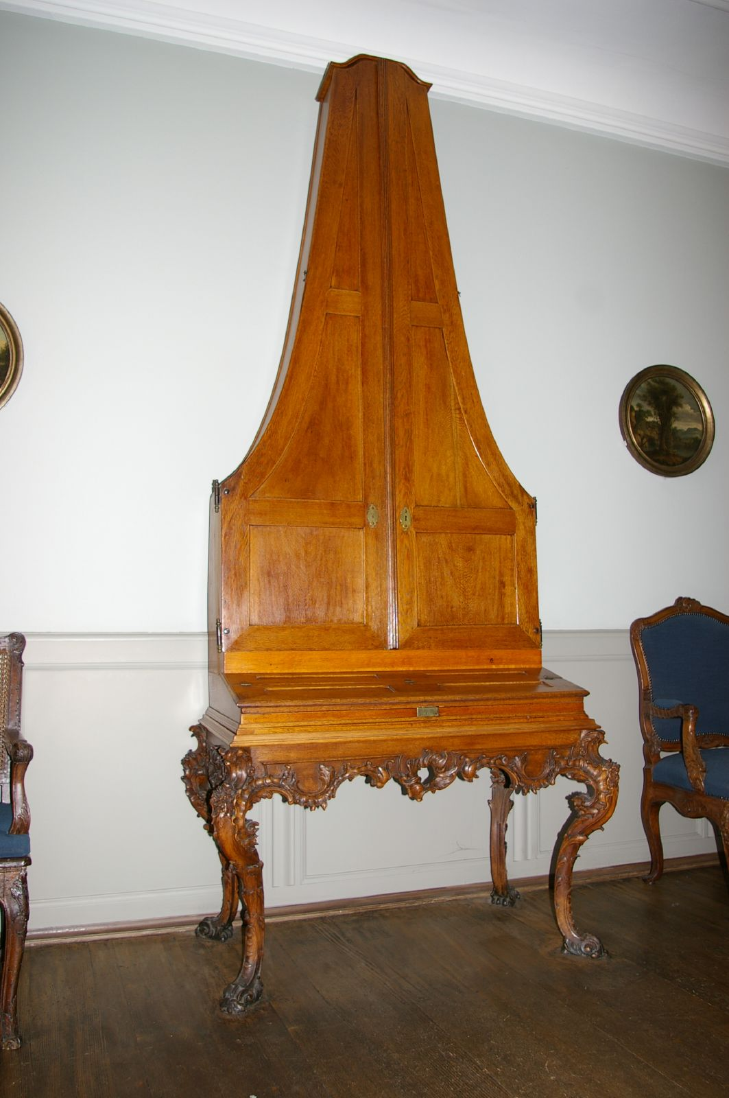 Piano à marteau de Christian Ernst Friderici